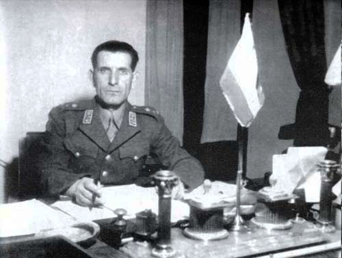 Sepahbod Haj Ali Razmara in his office during his Primeministership